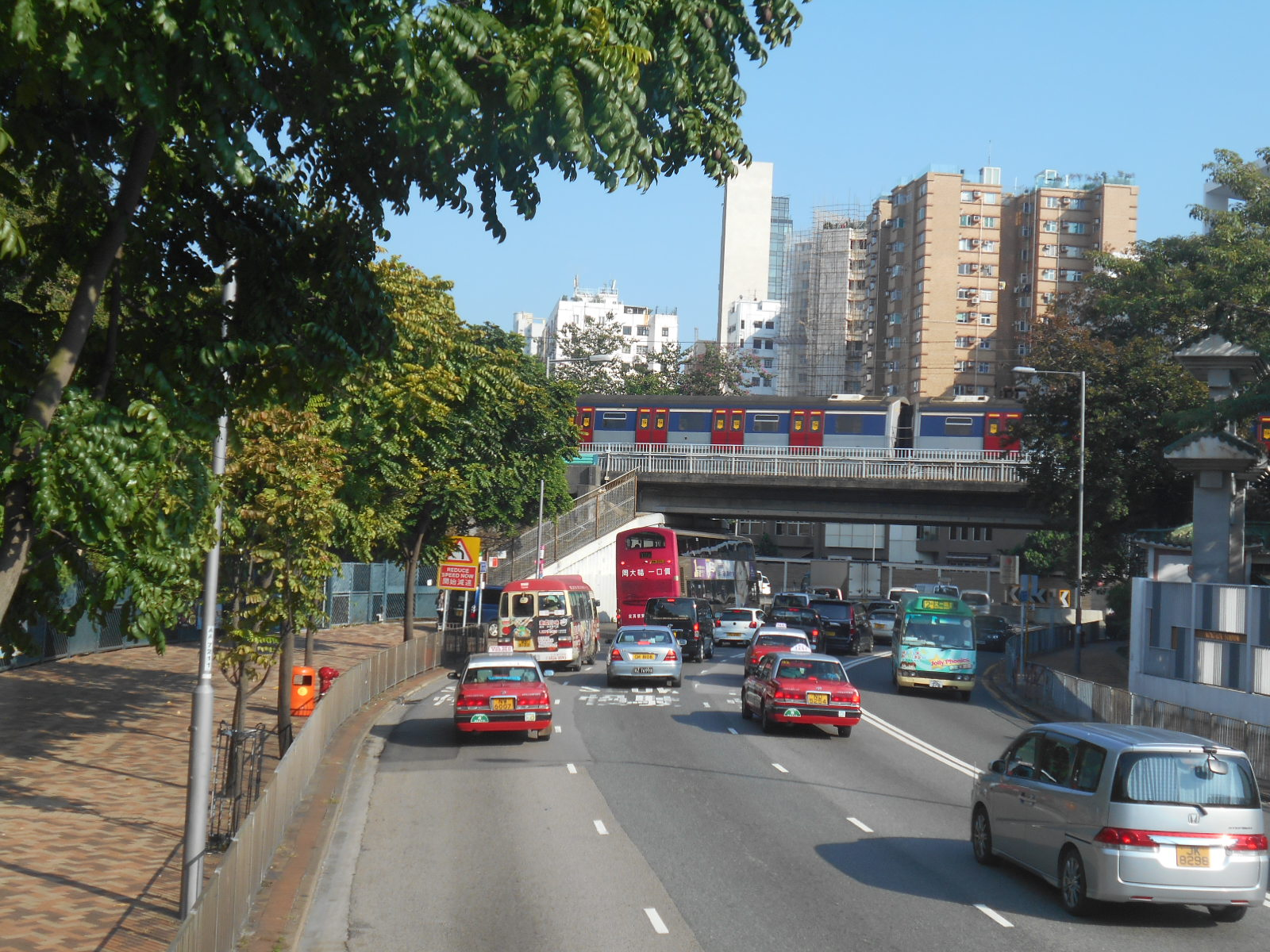 中文（香港）: 界限街近東鐵線架空橋的一段